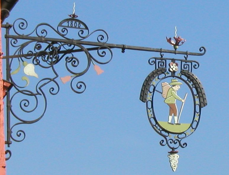 Wappen am Rathaus von Wandersleben in Thüringen, Deutschland